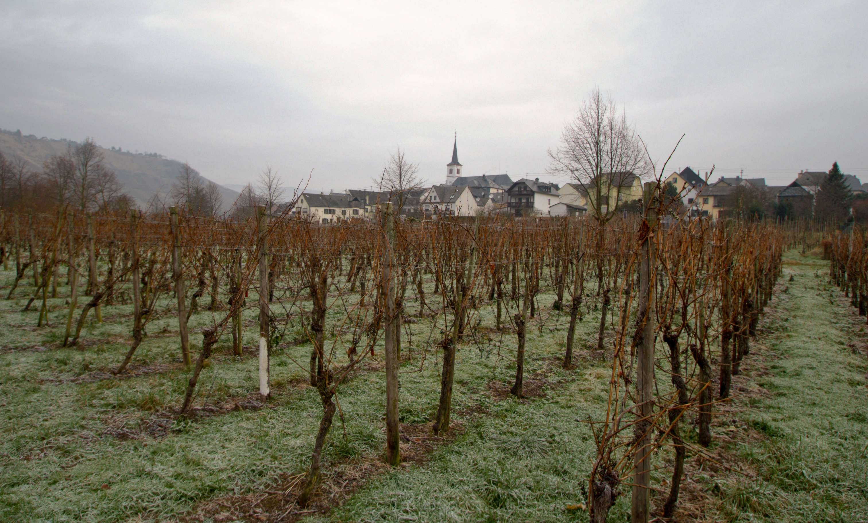 Blick auf Minheim, Weinreben im Vordergrund